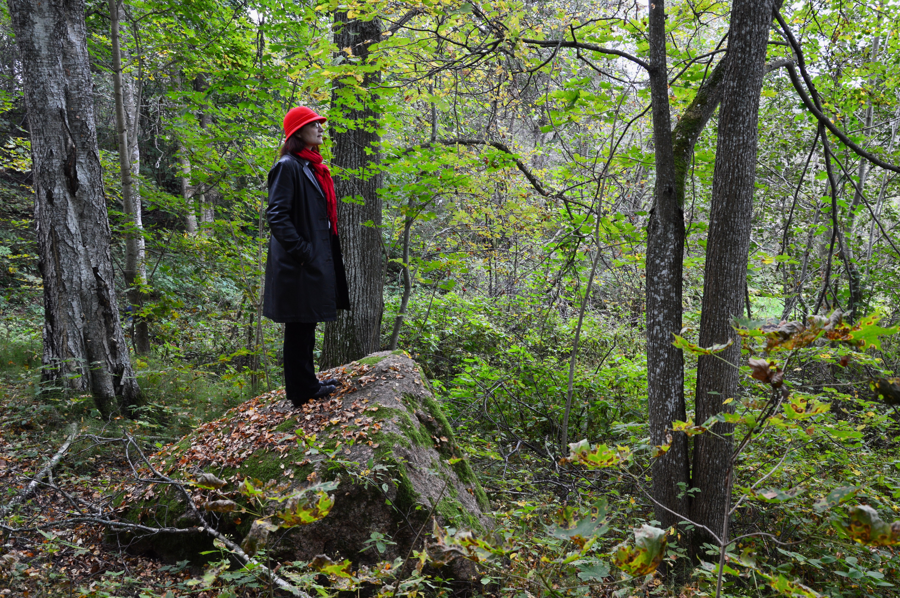 Vikipedist Poka järve ääres.